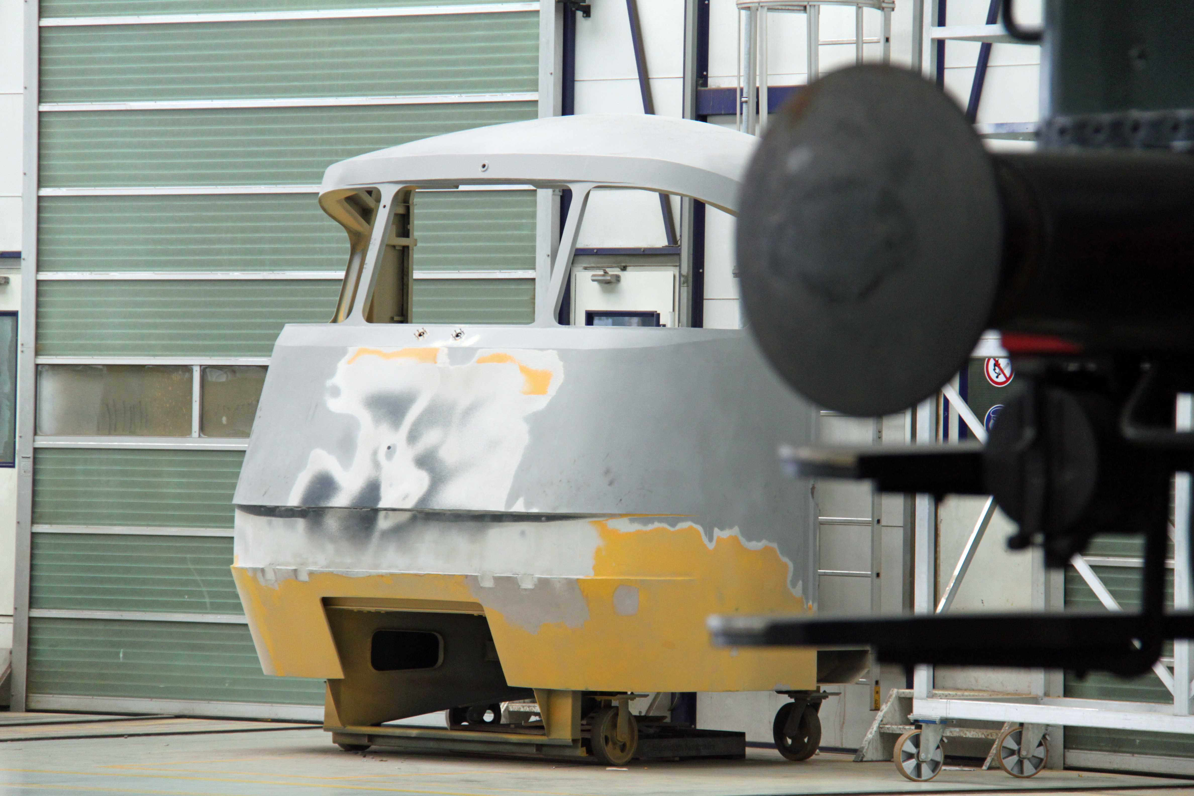 Een kop of reservekop van het materieeltype SGM in de werkplaats van Nedtrain te Haarlem